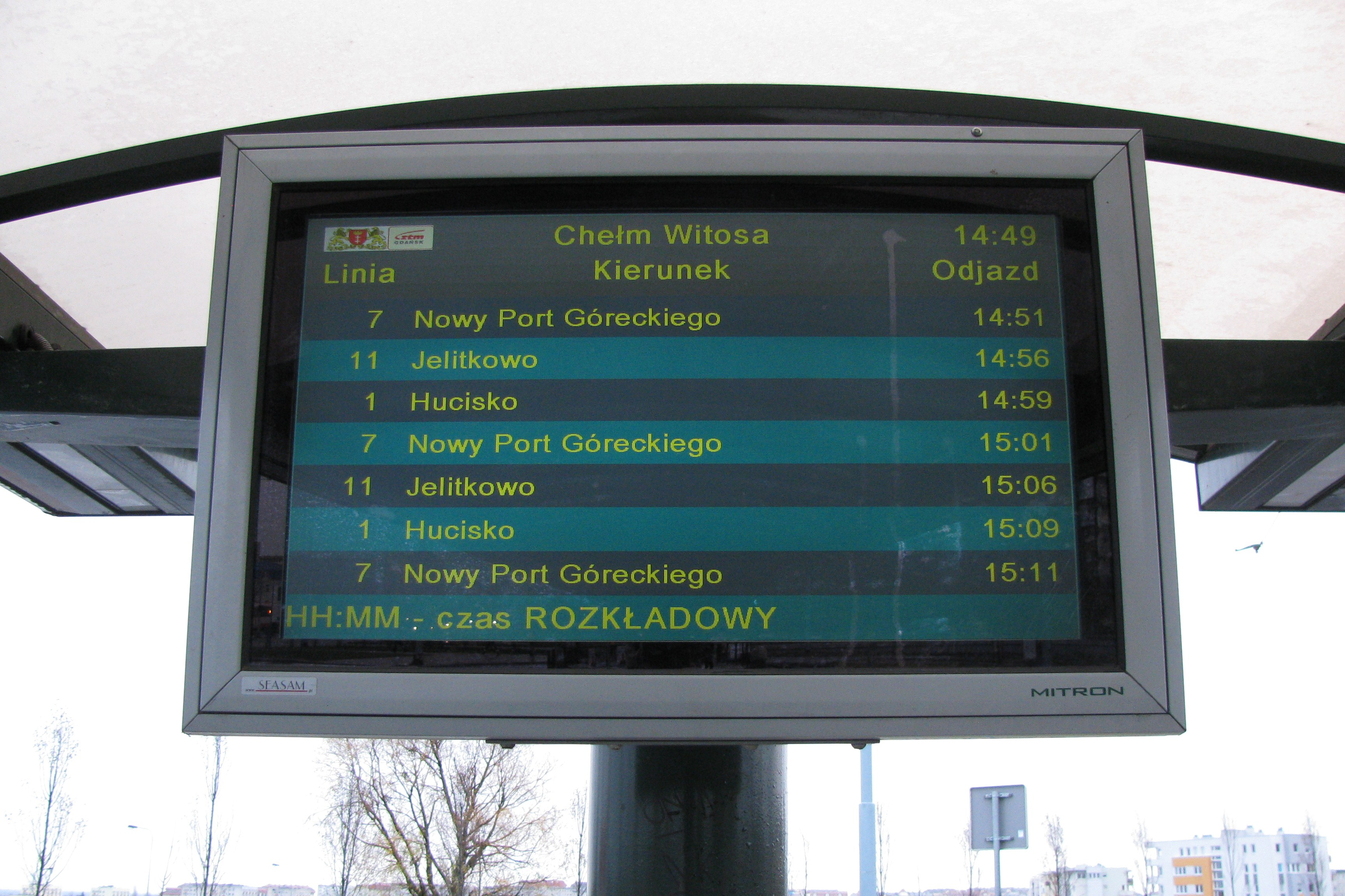 System Informacji Pasażerskiej (SIP) w Gdańsku - monitor LCD.